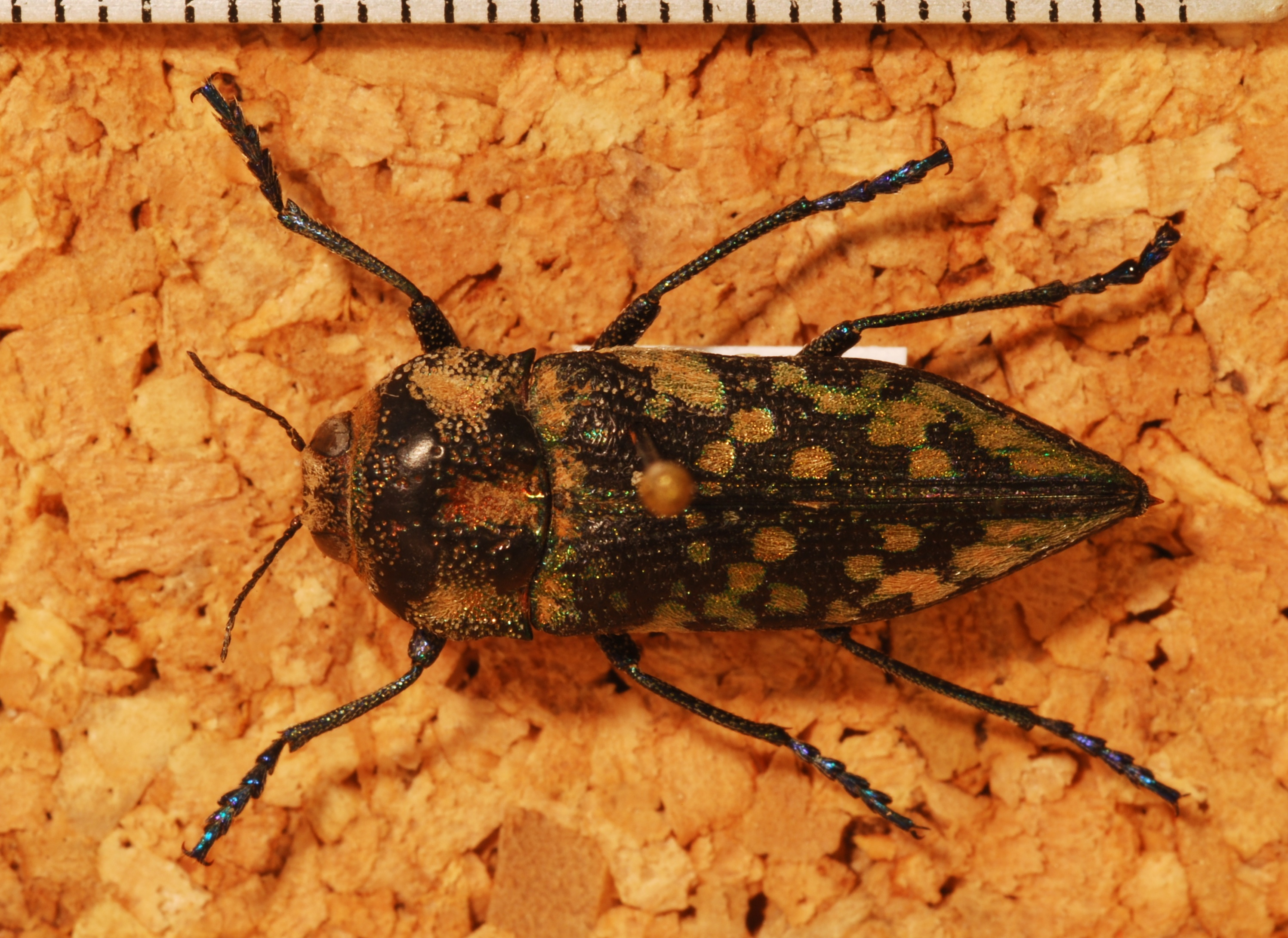 San Luis, ARGENTINA